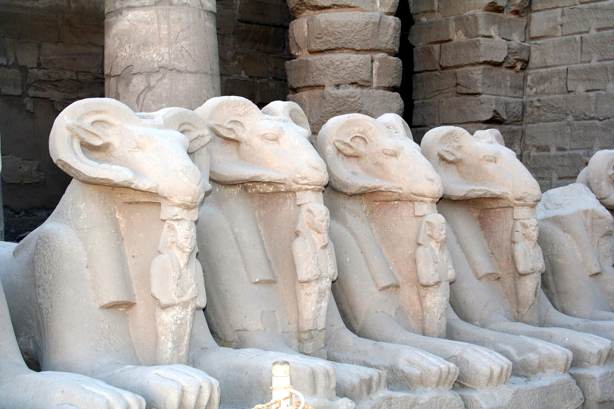 Karnak Temple at Luxor